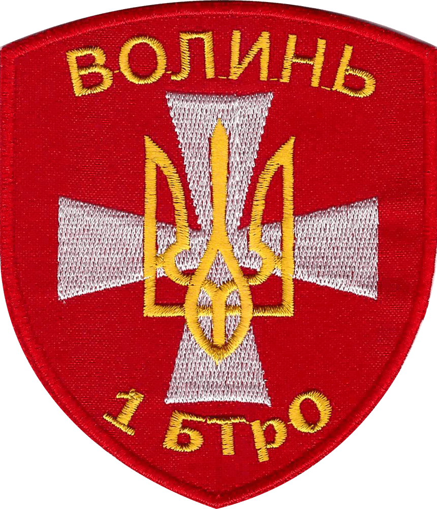 1-й БТрО ЗСУ Волинської області «Волинь».